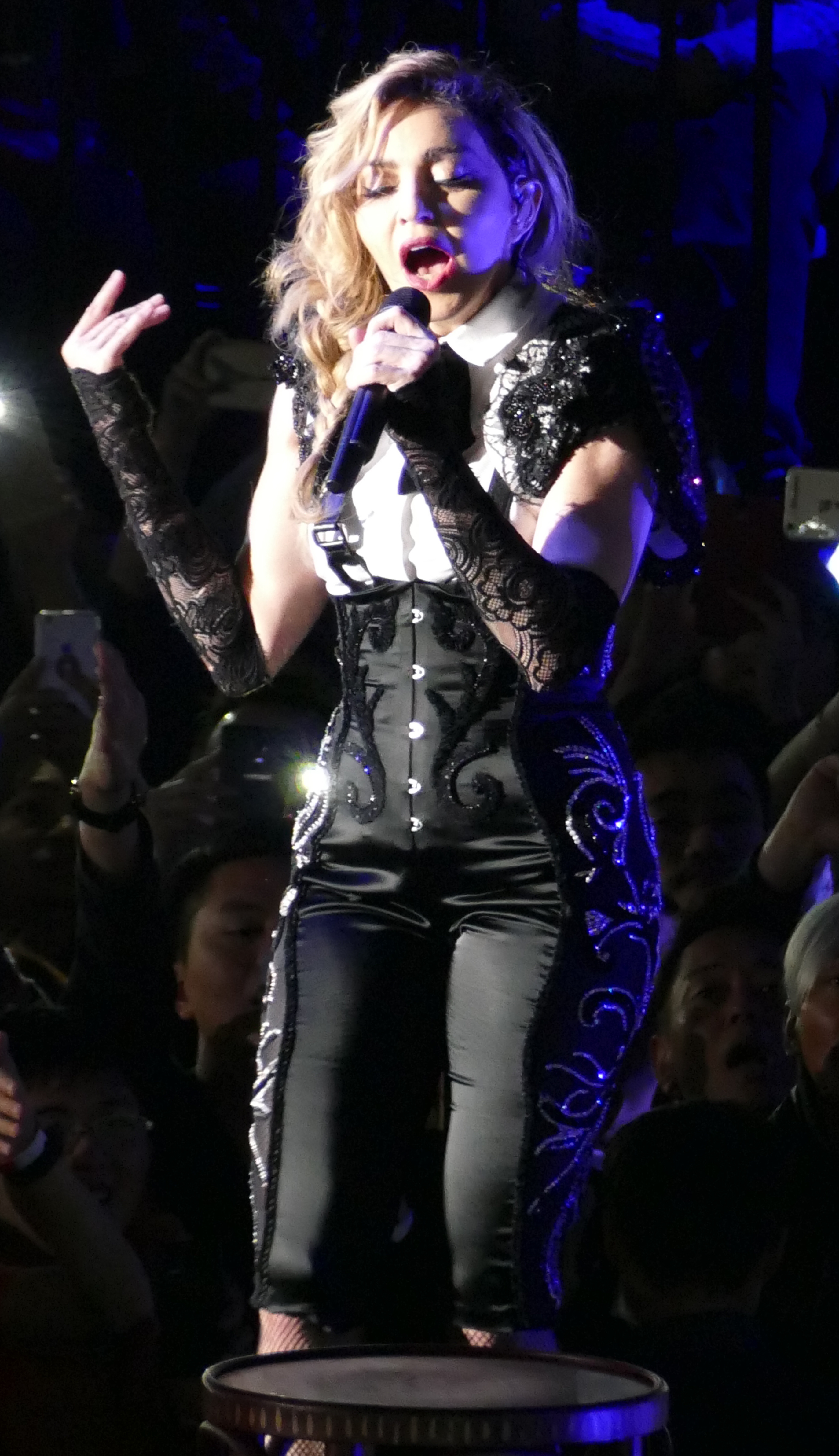 taipei_madonna_concert-228